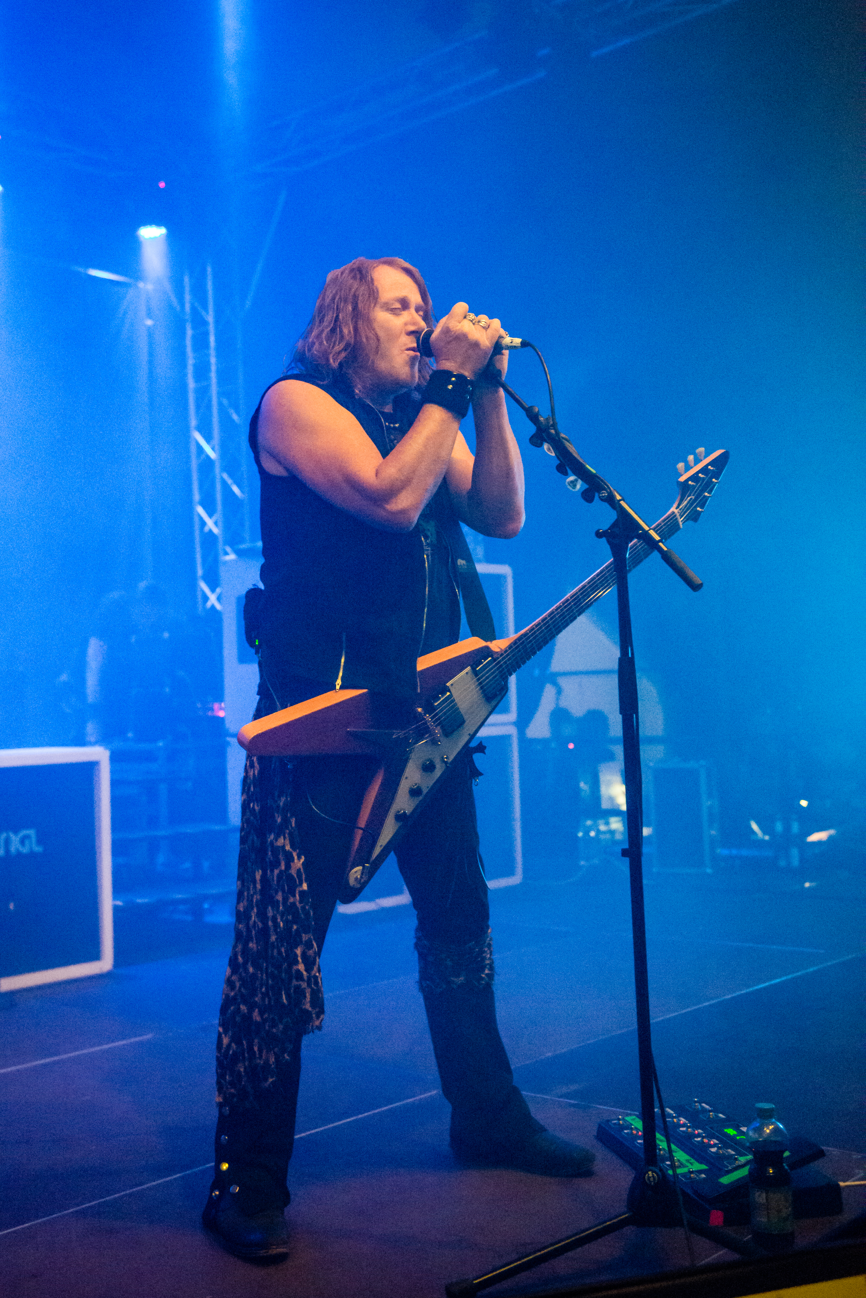 'Dong Open Air 2015; Neukirchen-Vluyn Halde Norddeutschland': 'Gamma Ray'